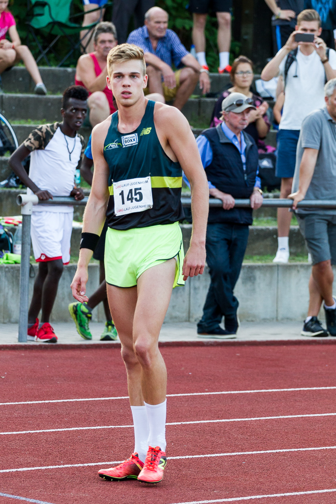 Abendsportfest des TSV Pfungstadt am 5. Juli 2017.